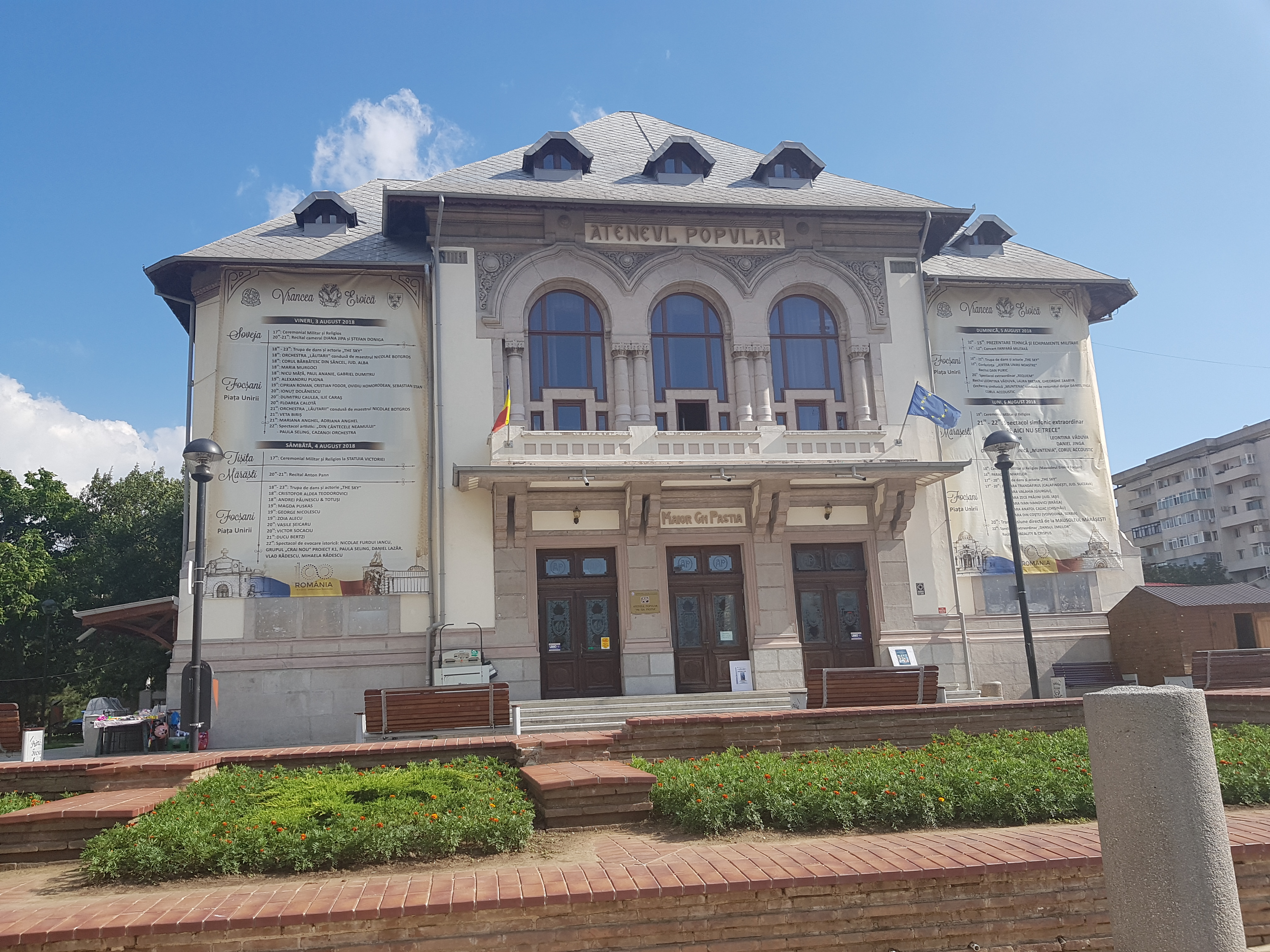 Ateneul Popular